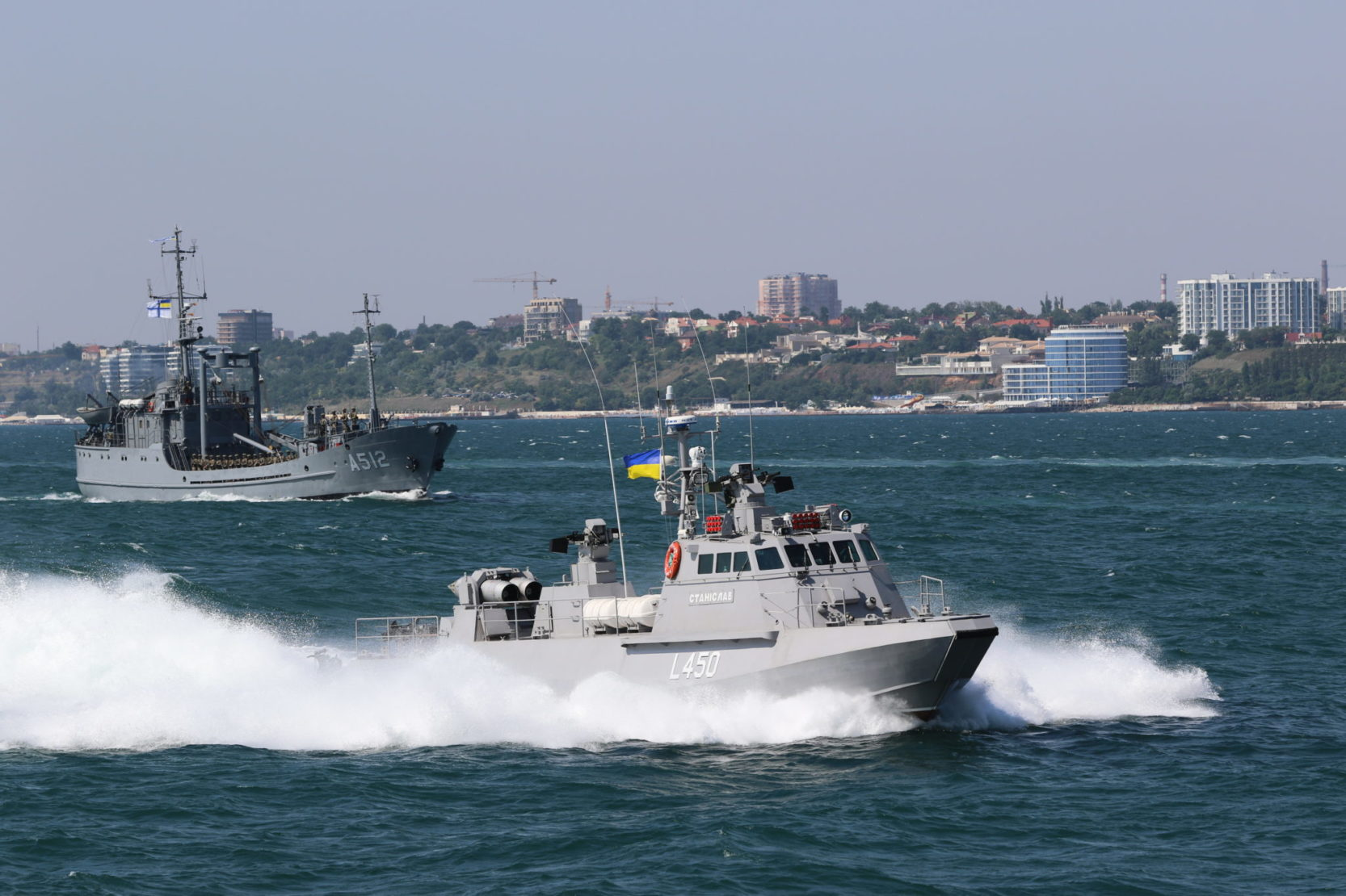 Броньований десантно-штурмовий катер проєкту 58503 L450 «Станіслав»